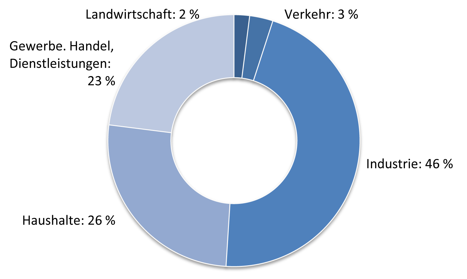 Netto-Stromverbraucher nach Verbrauchergruppen 2011, Quelle: BDEW, Stand 08/2012